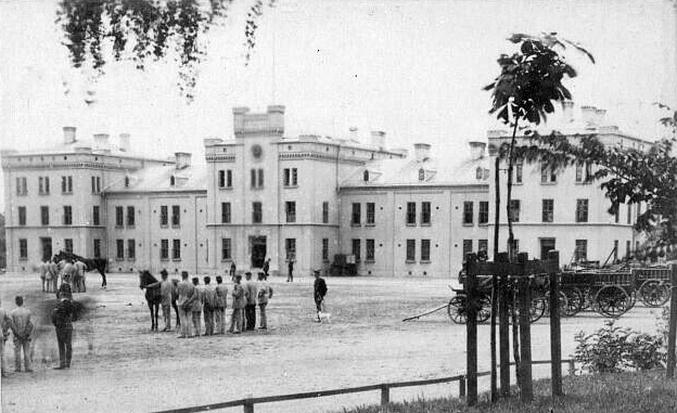 Trängkåren, Marieberg. Byggnadsår 1887. Arkitekt: Adolf Leonard Billmanson